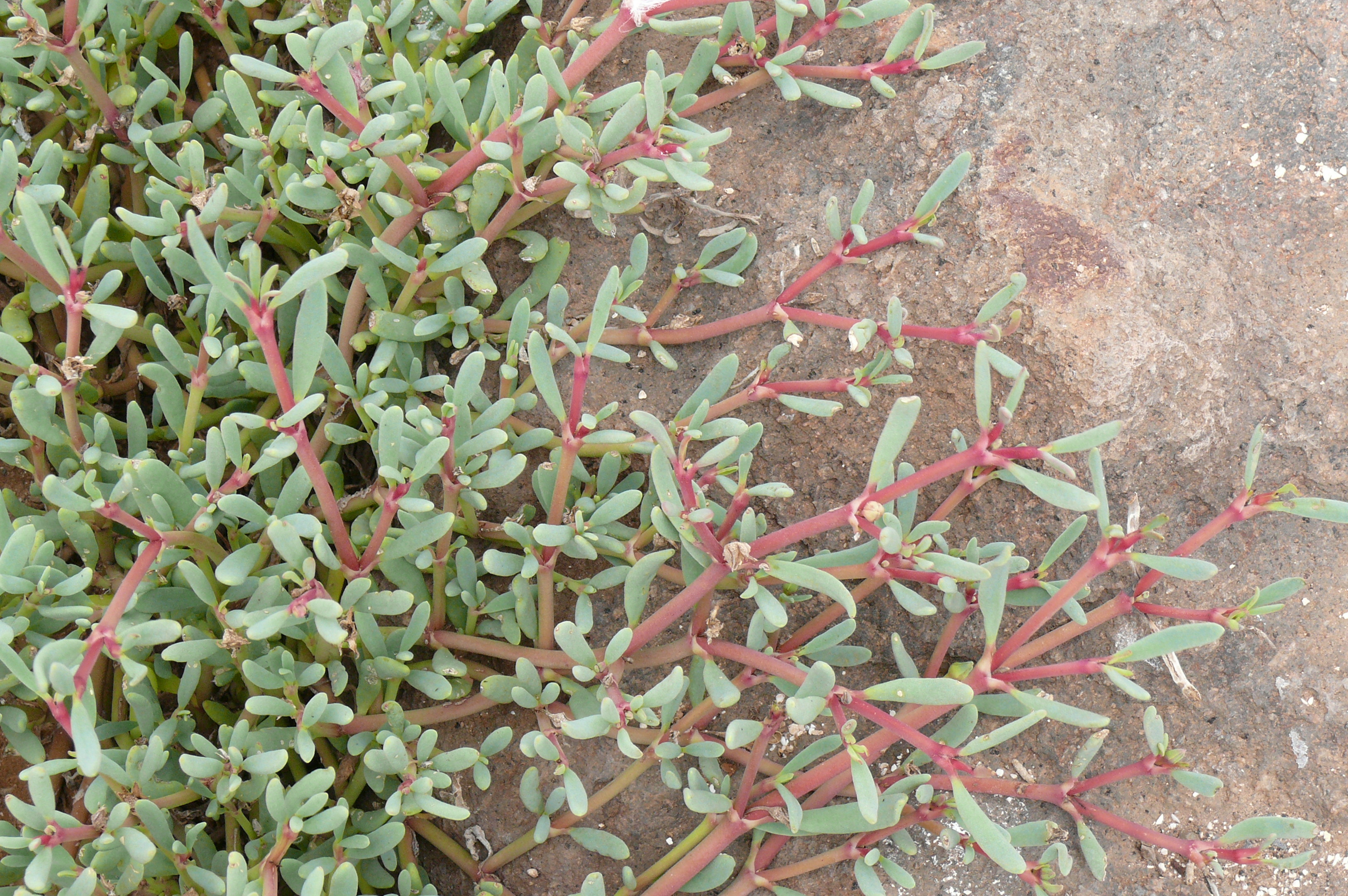 Galapagos-Secuvie (Sesuvium edmonstonei), Place: Seymour norte